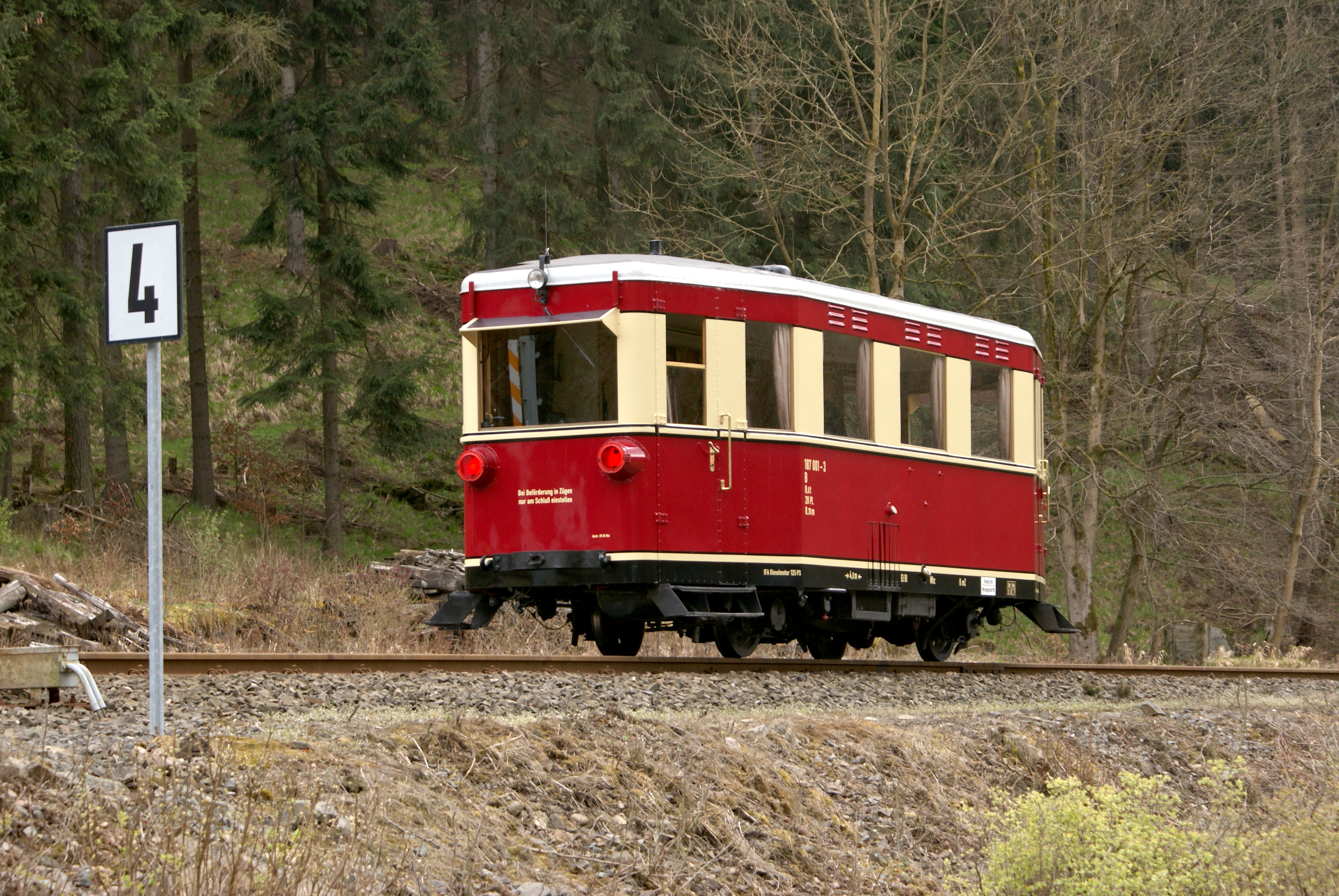 Triebwagen 187 001 ex DR VT 133 522 ex GHE T1 (Dessau 3046/1933 , A1 dm) als Sonderzug im Bahnhof Eisfelder Talmühle am 21. April 2012